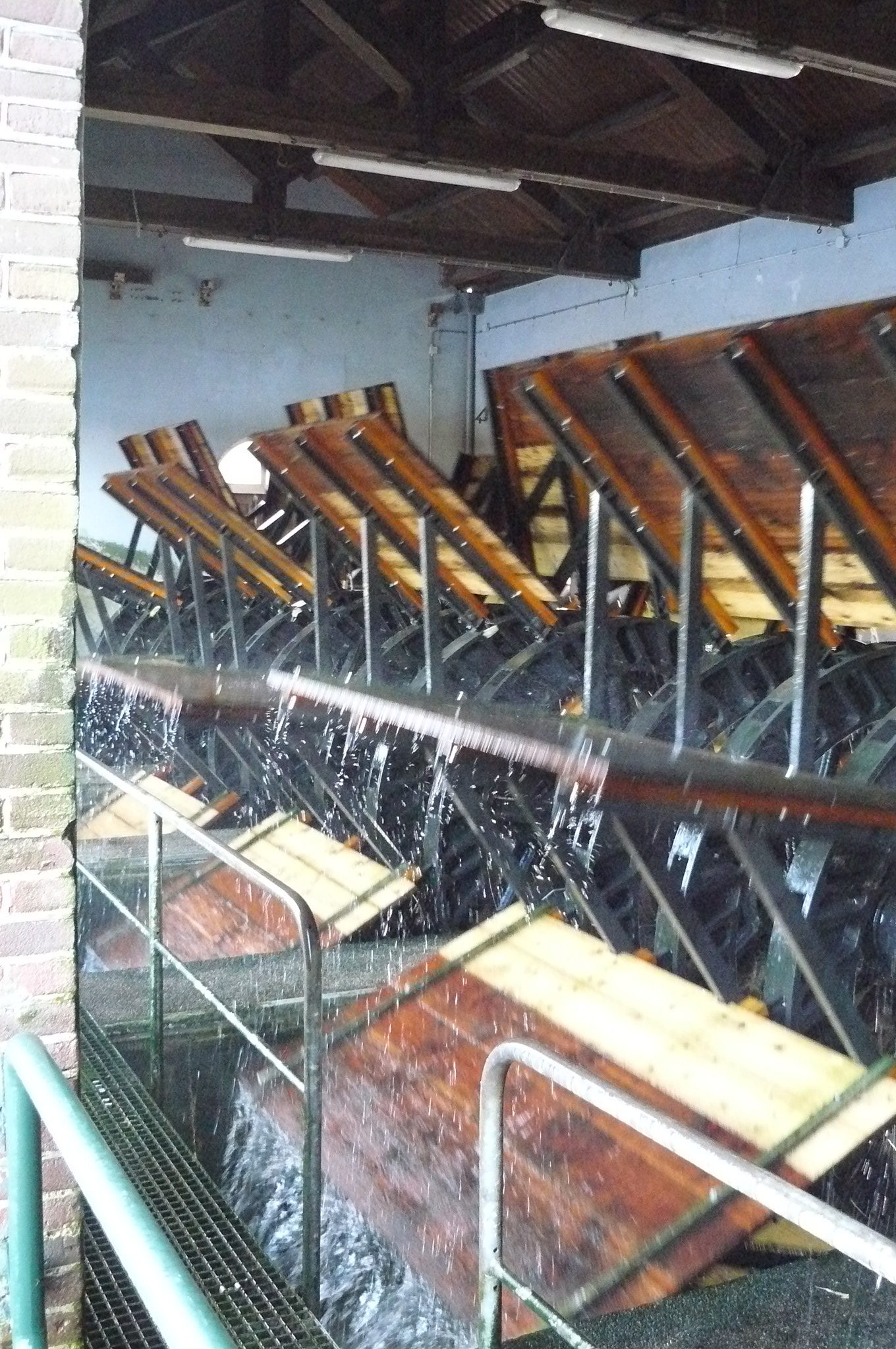 De schepradaren van het Gemaal Spaarndam in vol bedrijf.